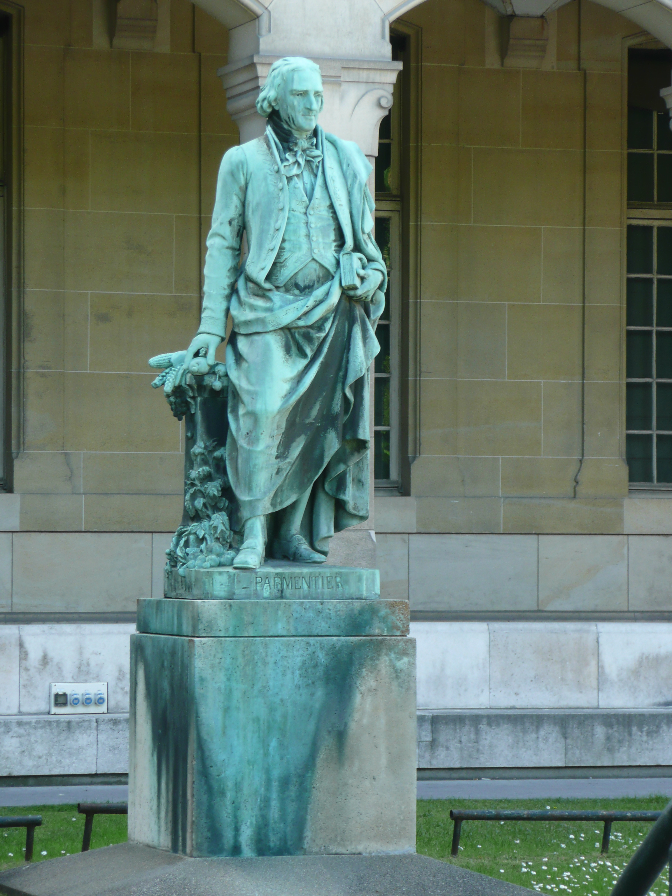 Statue de Parmentier à la faculté de pharmacie de Paris, bronze par Pierre Hébert (1804-1869), fondeur Victor Thiébaut